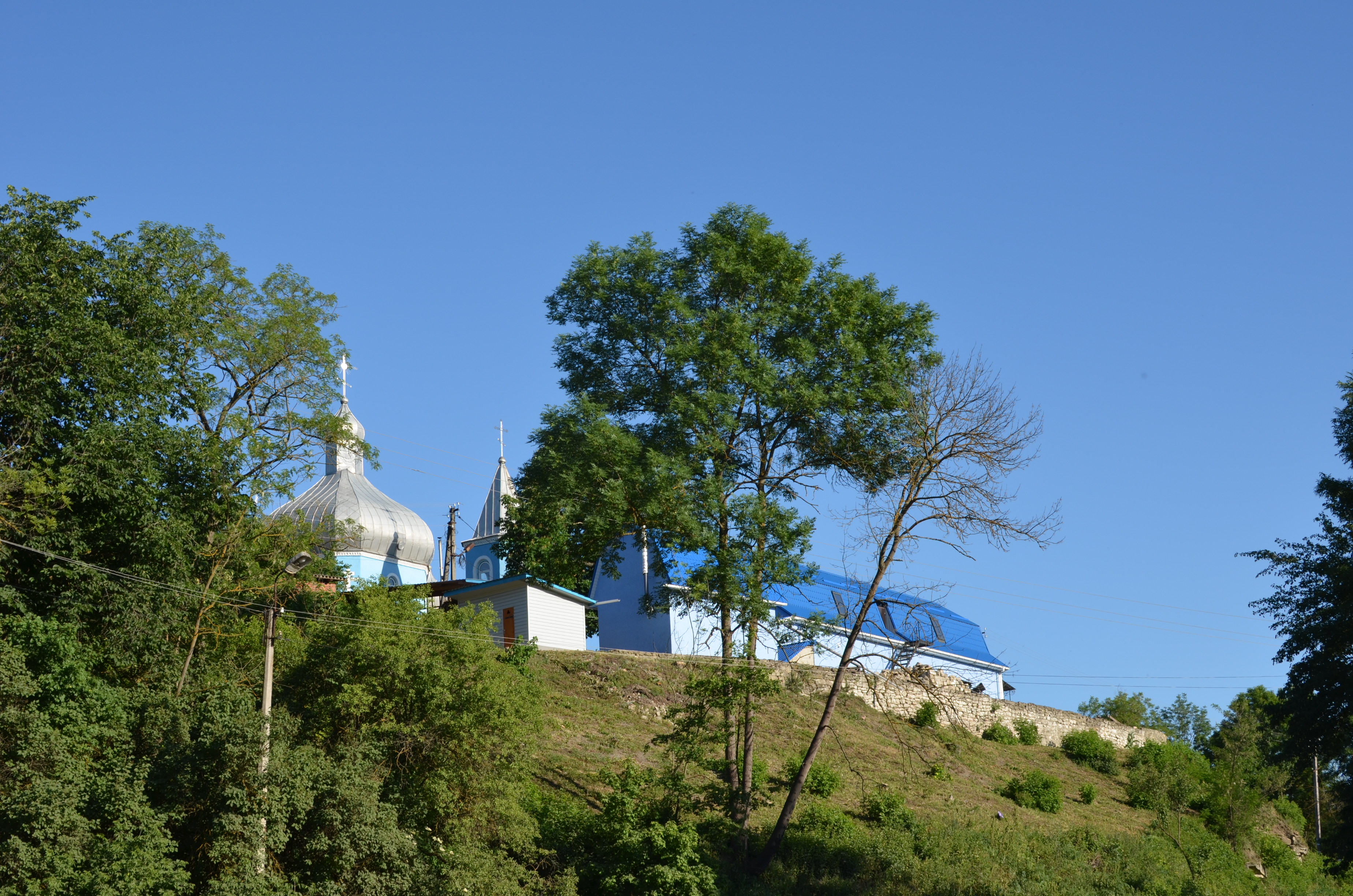 смт Муровані Курилівці.